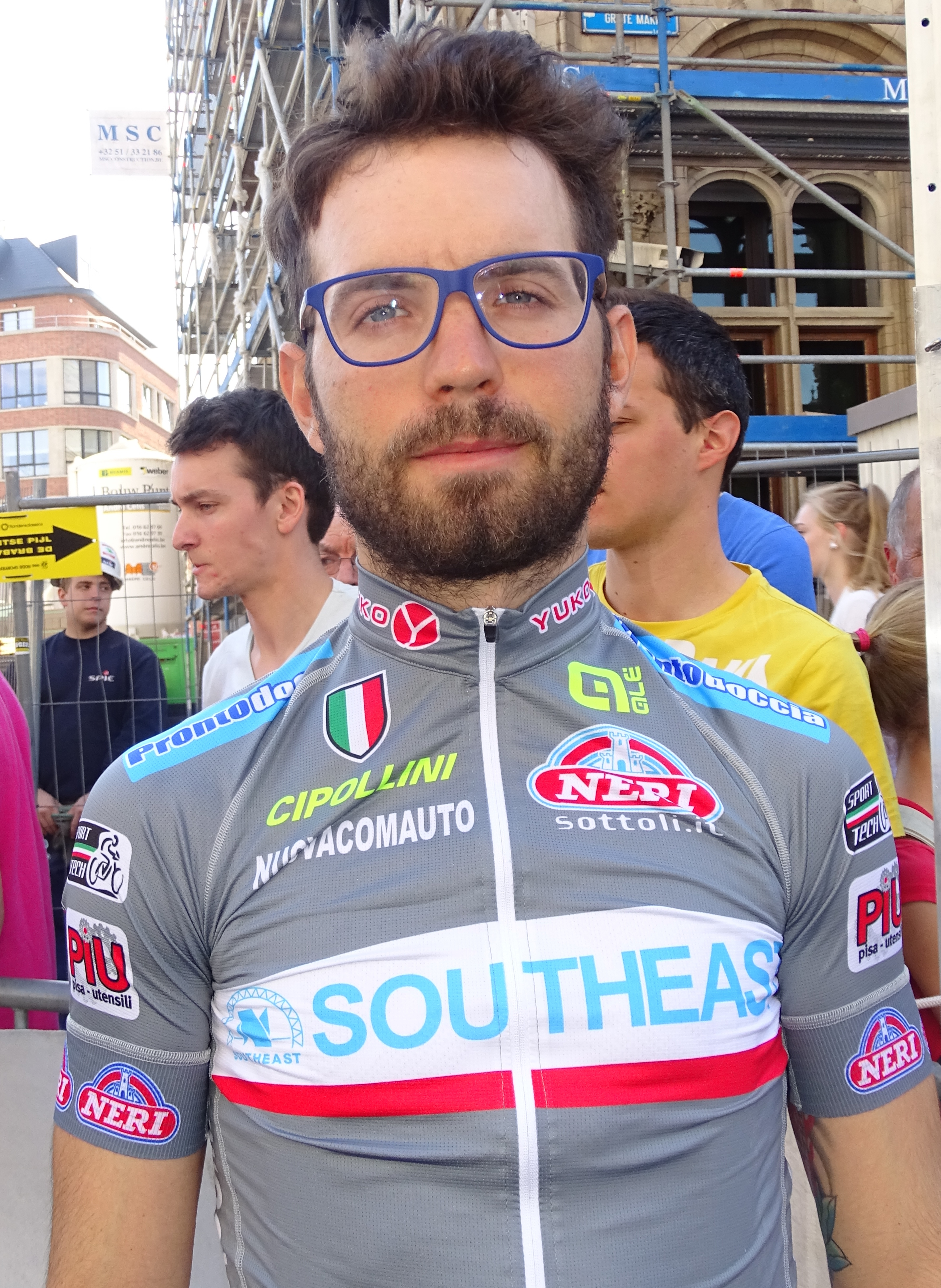 Reportage réalisé le mercredi 15 avril à l'occasion du départ de la Flèche brabançonne 2015 à Louvain, Belgique.